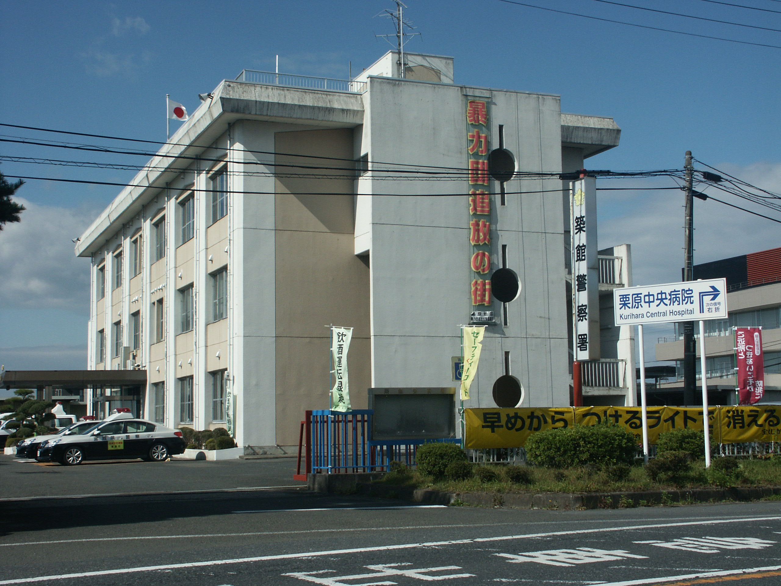 宮城県築館警察署庁舎